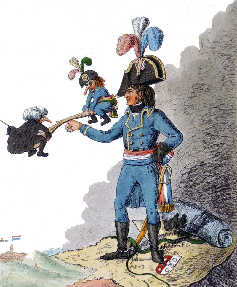 "Die politische Schaukel". Zeitgenössische Karikatur über die Zustände in der Helvetischen Republik 1803. Napoleon Bonaparte hält auf einer Schaukel die aristokratisch-föderalistischen und die revolutionär-unitarischen Kräfte im Gleichgewicht, während er sich nach dem Grundsatz "teile und herrsche" das Wallis unter den Nagel schlägt. Auf der Schaukel steht hodie mihi, cras tibi (heute mir, morgen dir). Im Hintergrund links die Stadt Mailand, zu der das Wallis der strategische Schlüssel ist (Simplonpass)